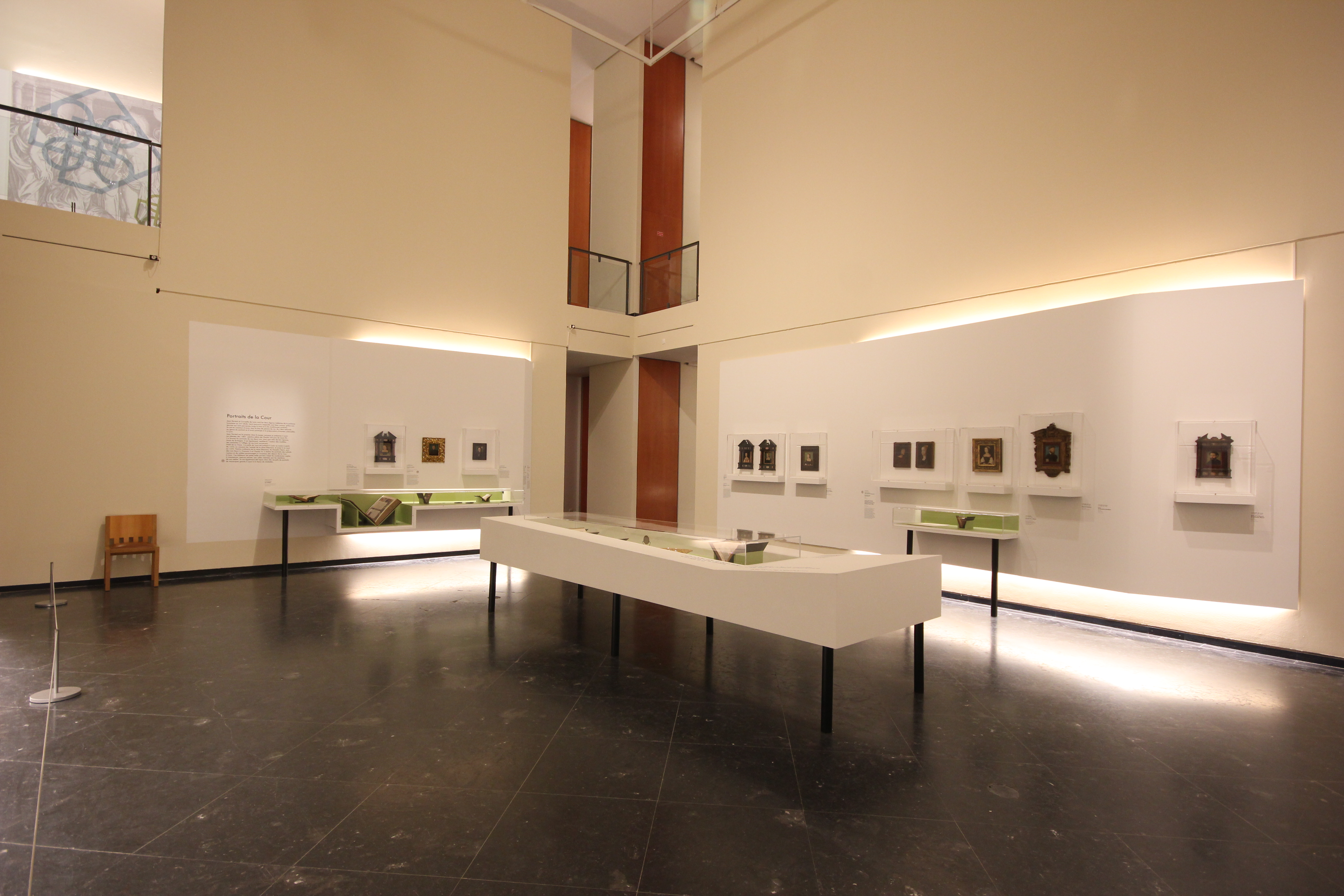 Musée des Beaux-Arts de Lyon - Exposition Lyon Renaissance - Vue des salles